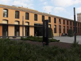 Edifici remodelat de l'antic Vapor Badia, ara convertit en Biblioteca Pública